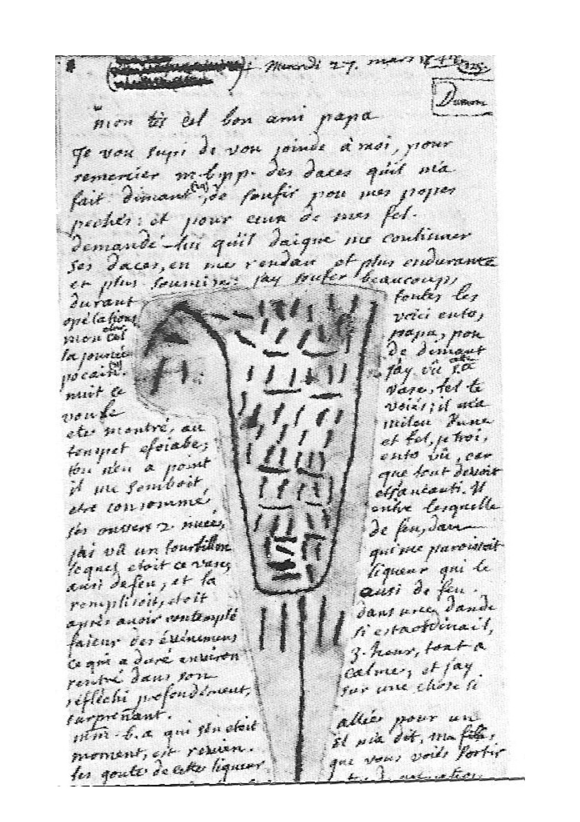 Manuscrit transcrivant le discours des visions d'une convulsionnaire